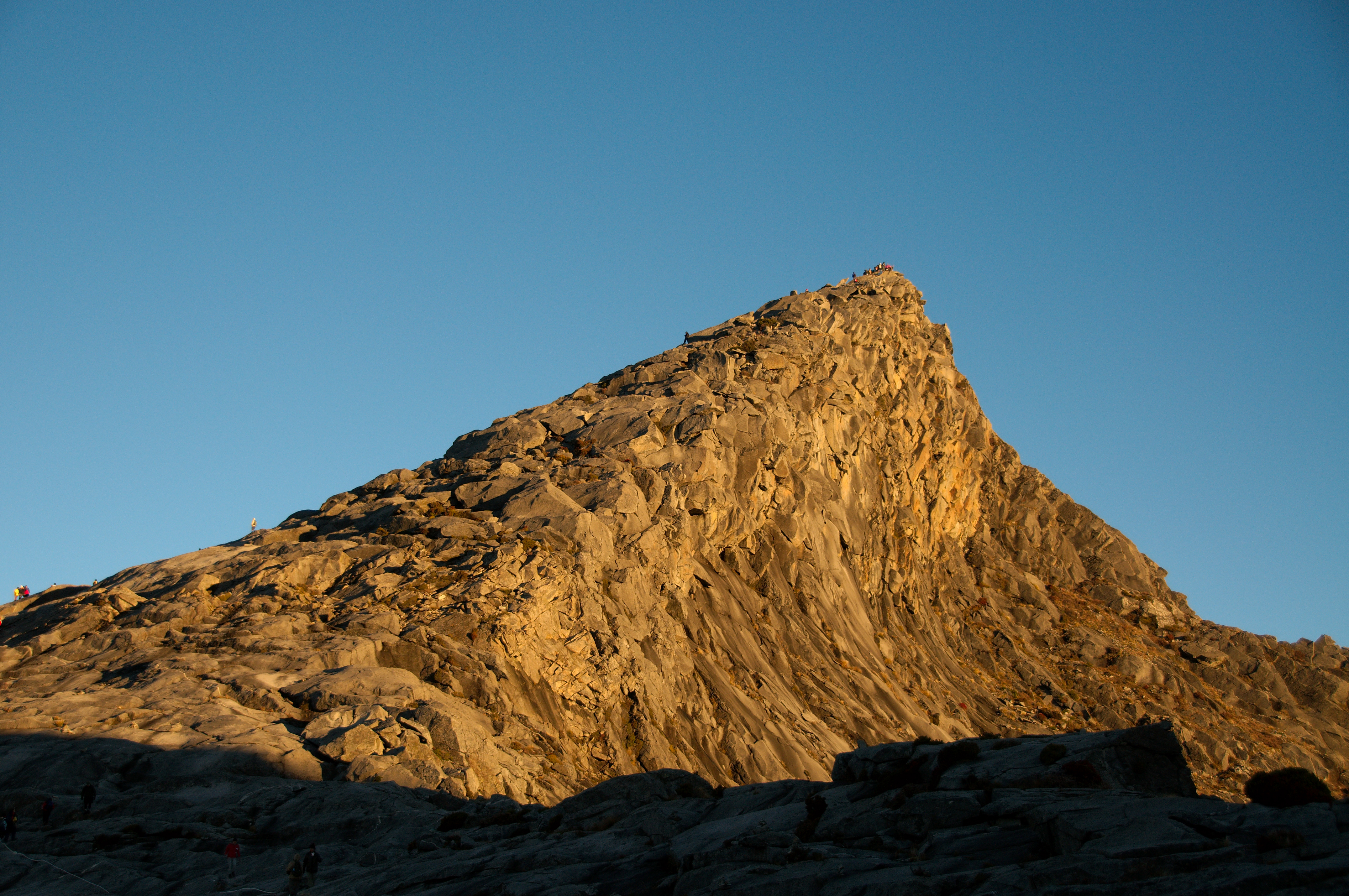 Sunlit peak of Mount Kinabalu, Sabah Province, Malaysia.